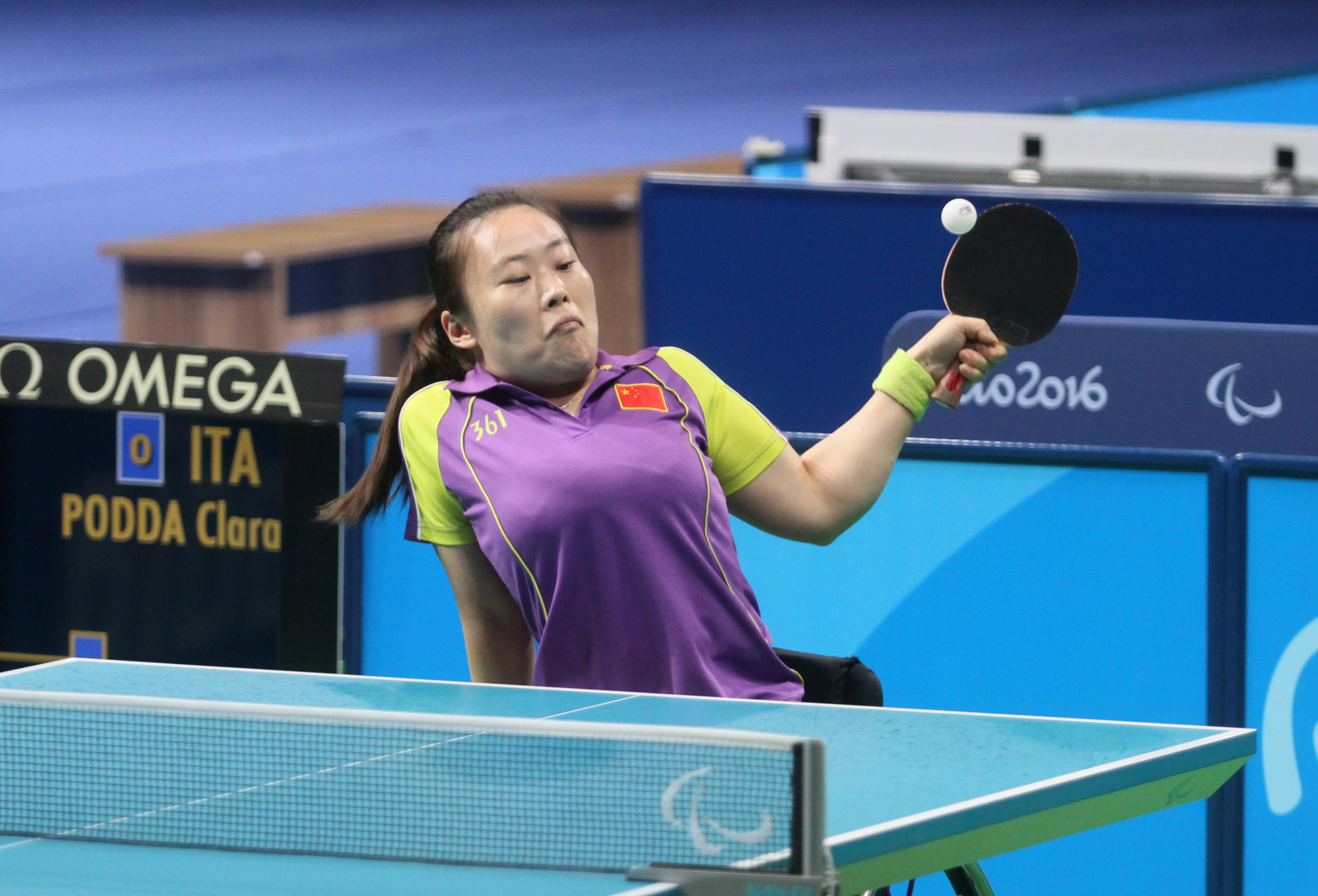 LI Qian (CHN,F3) IMG_5710